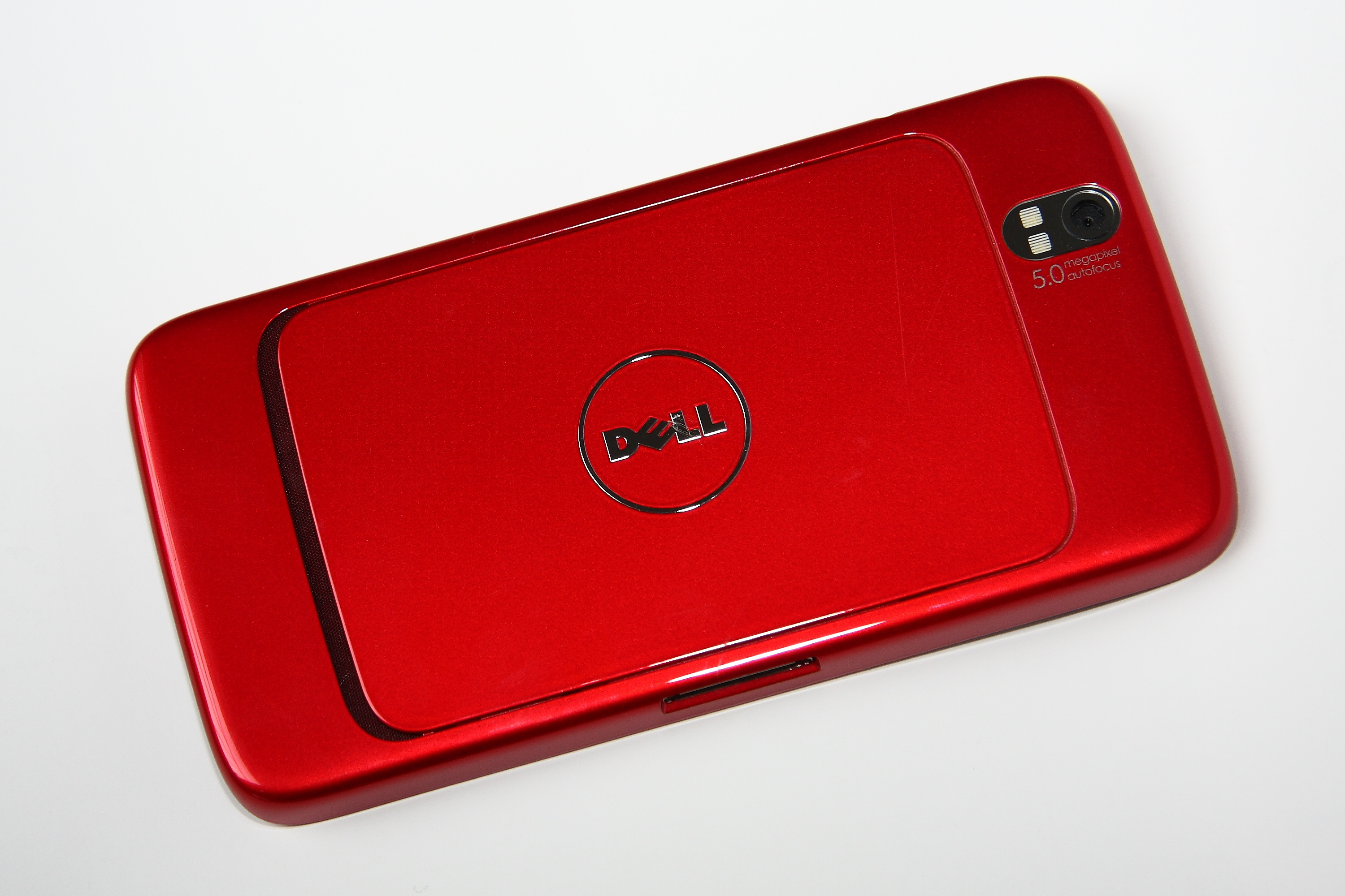 Tablett-PC Dell Streak